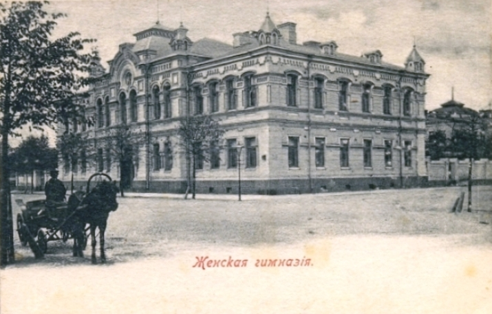 Открытка конца 19 века с изображением русской женской гимназии в Выборге